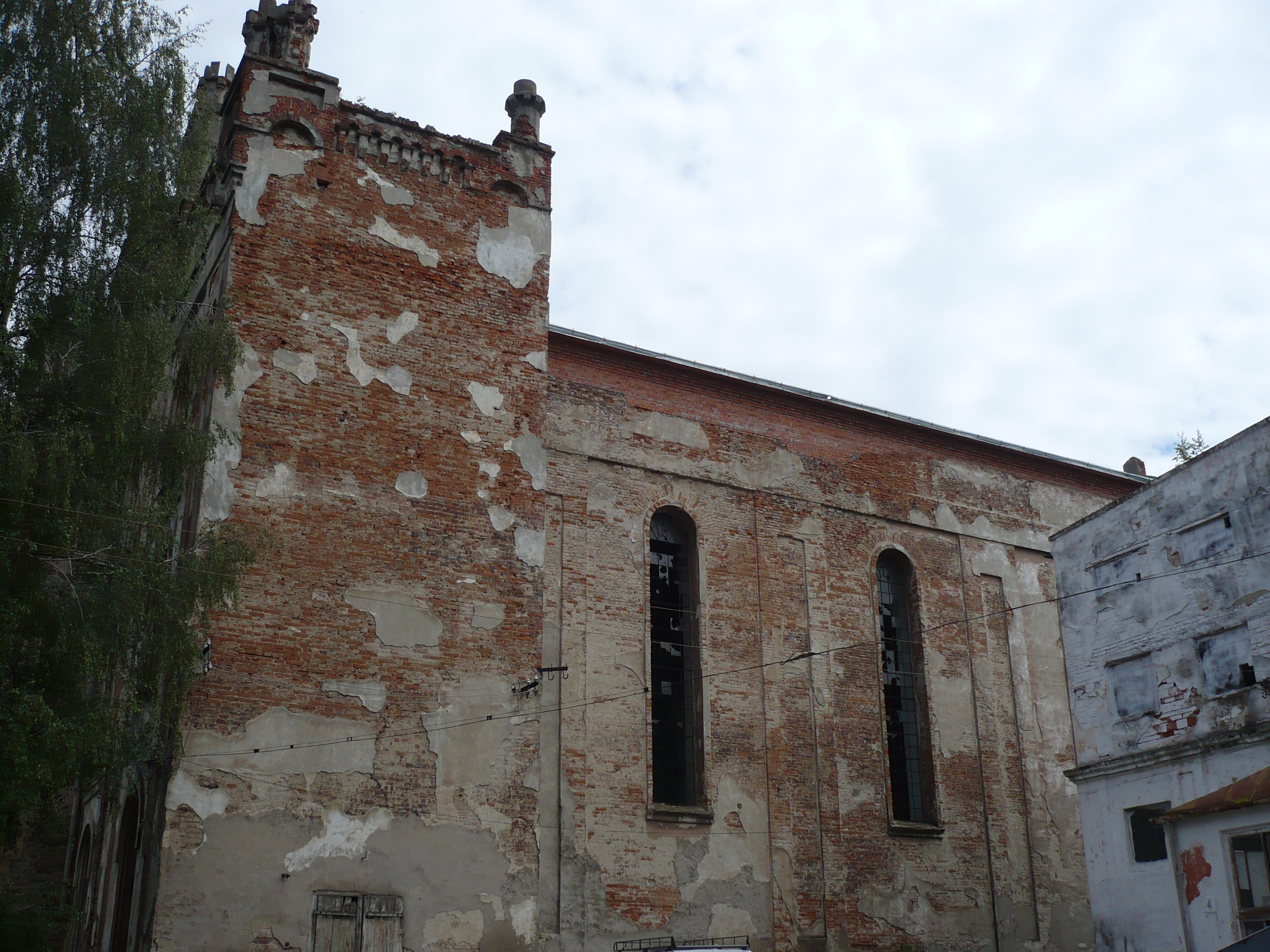 Wielka Synagoga, fragment